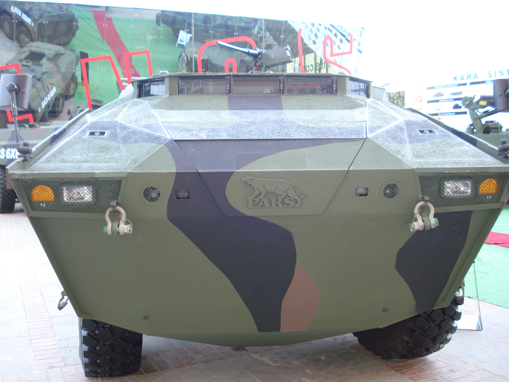 IDEF '07 Savunma Fuarı'nda çekildi.FNSS Pars. 23 Mayıs 2007